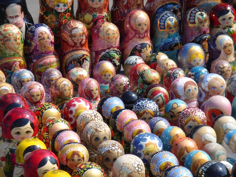 Matroschkas